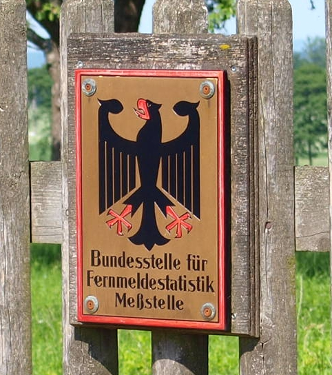 Schild der Bundesstelle für Fernmeldestatistik Messstelle in Butzbach